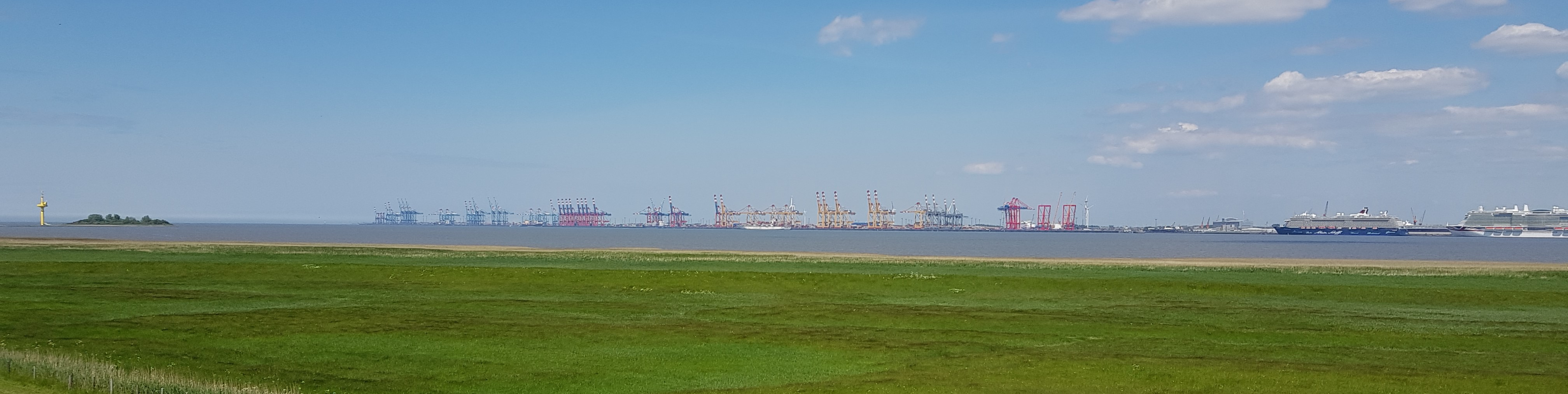 Containerterminal Bremerhaven, fotografiert im Mai 2020 von der westlichen Weserseite